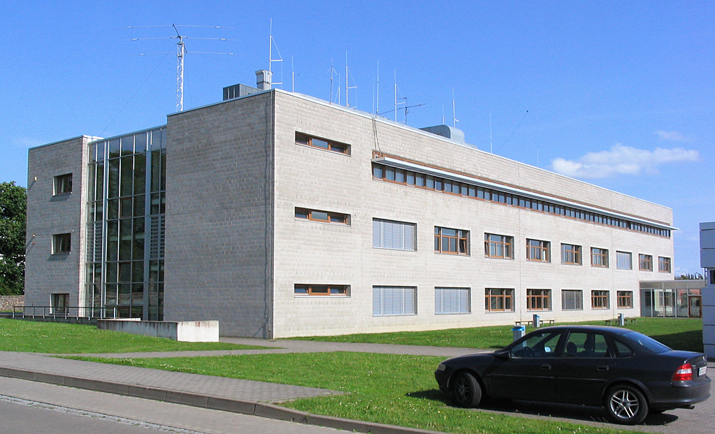 Beschreibung: Fachhochschule Stralsund - Haus 19 - Fachbereich Maschinenbau Fotograf: Darkone, 16. Juli 2004